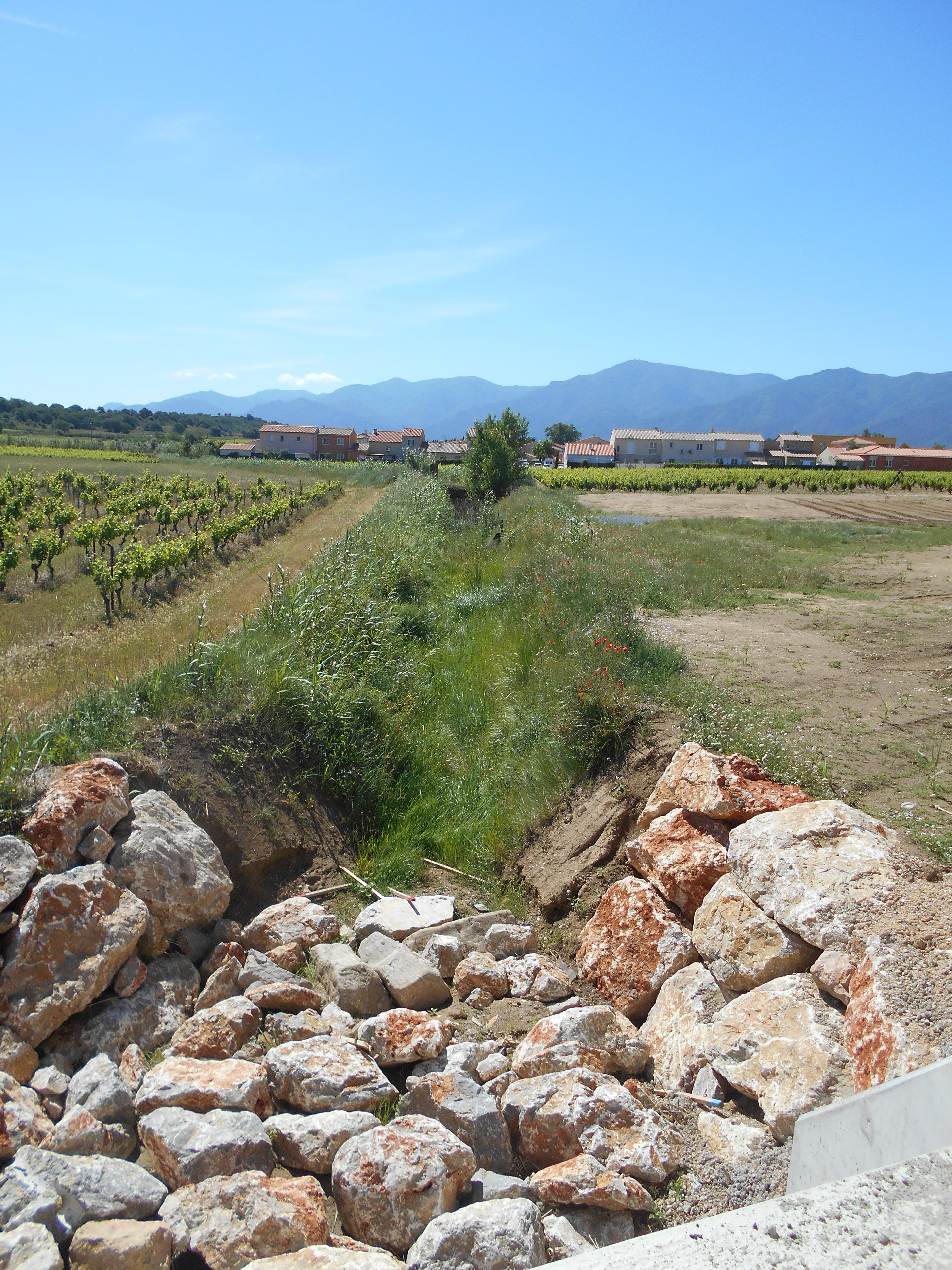 Unknown language: El Còrrec del Salt de la Folla